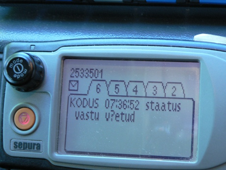 Kiirabiauto statsionaarse raadiojaama staatussõnum "kodus".